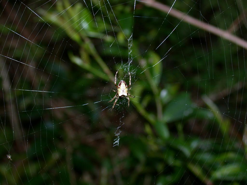 Eriophora astridae：サガオニグモ 2008/05/03 和歌山県田辺市: Tanabe City, Wakayama pref. Japan.